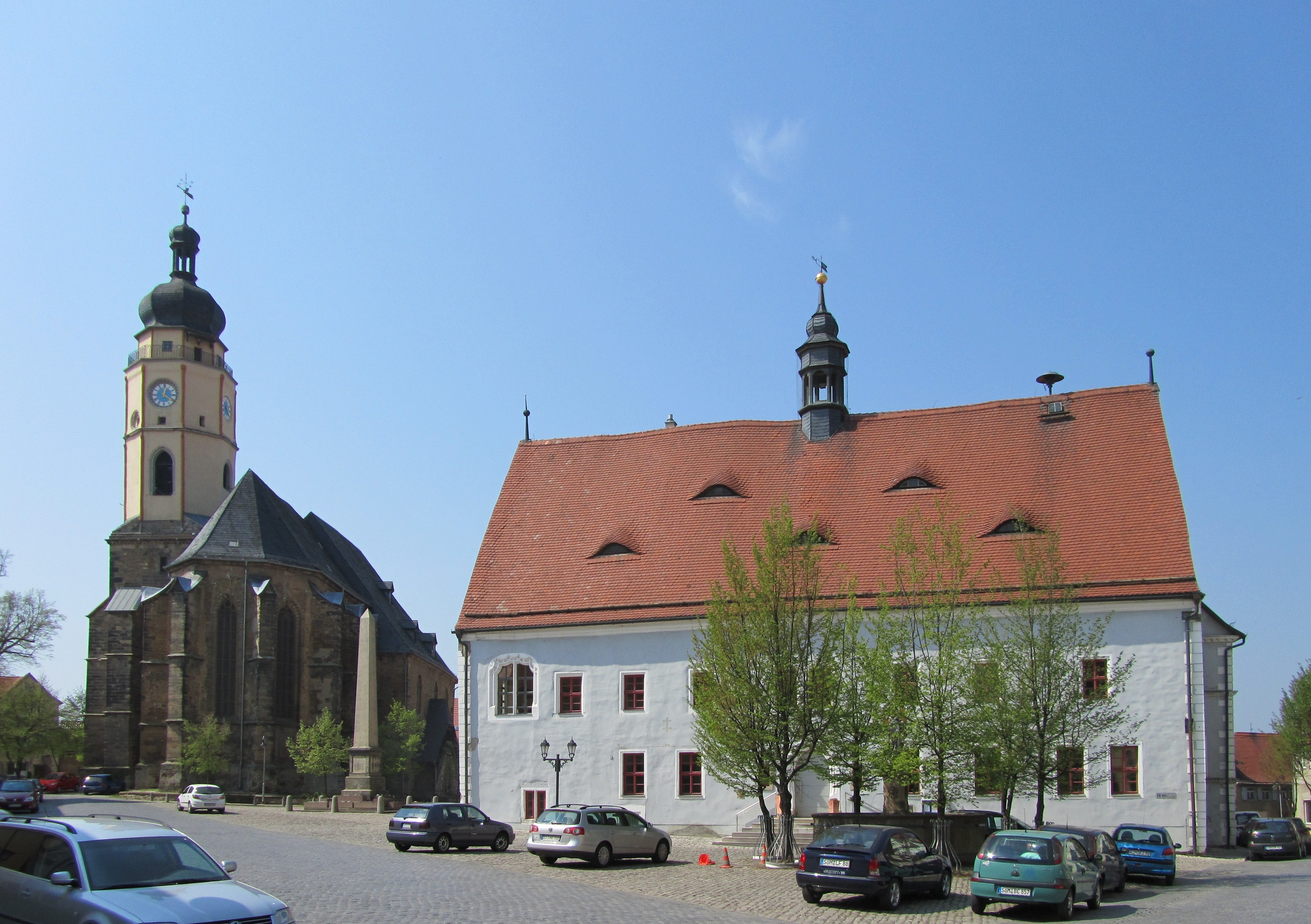 Der Marktplatz von Buttstädt (Thüringen) mit Stadtkirche, Obelisk und Rathaus.